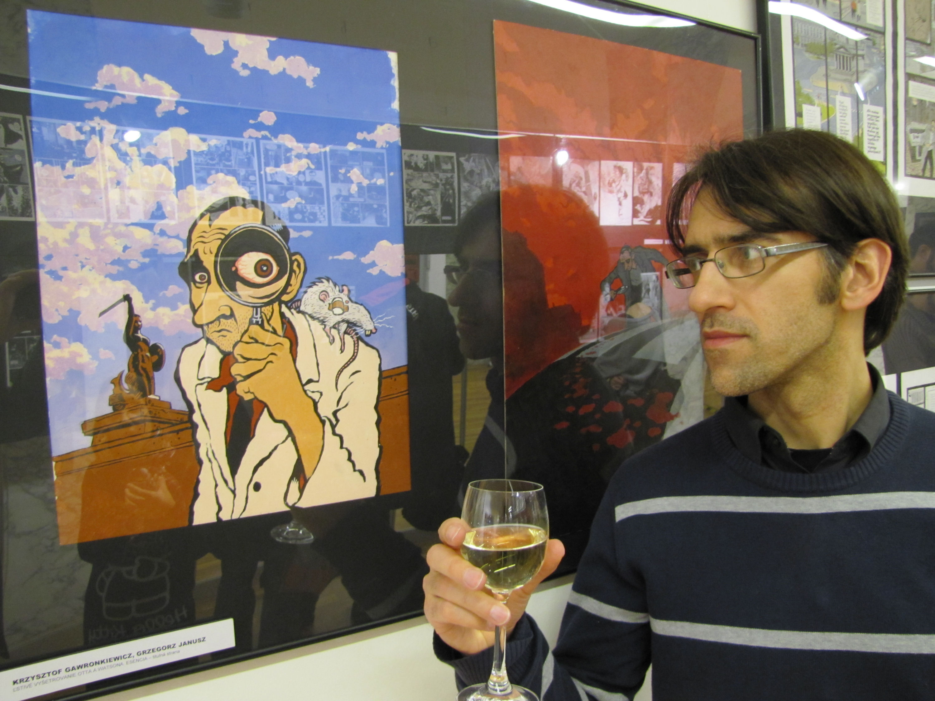 Krzysztof Gawronkiewicz, wernisaż wystawy Czas na komiks, Bratysława, luty 2011, fot. Piotr Machłajewski.